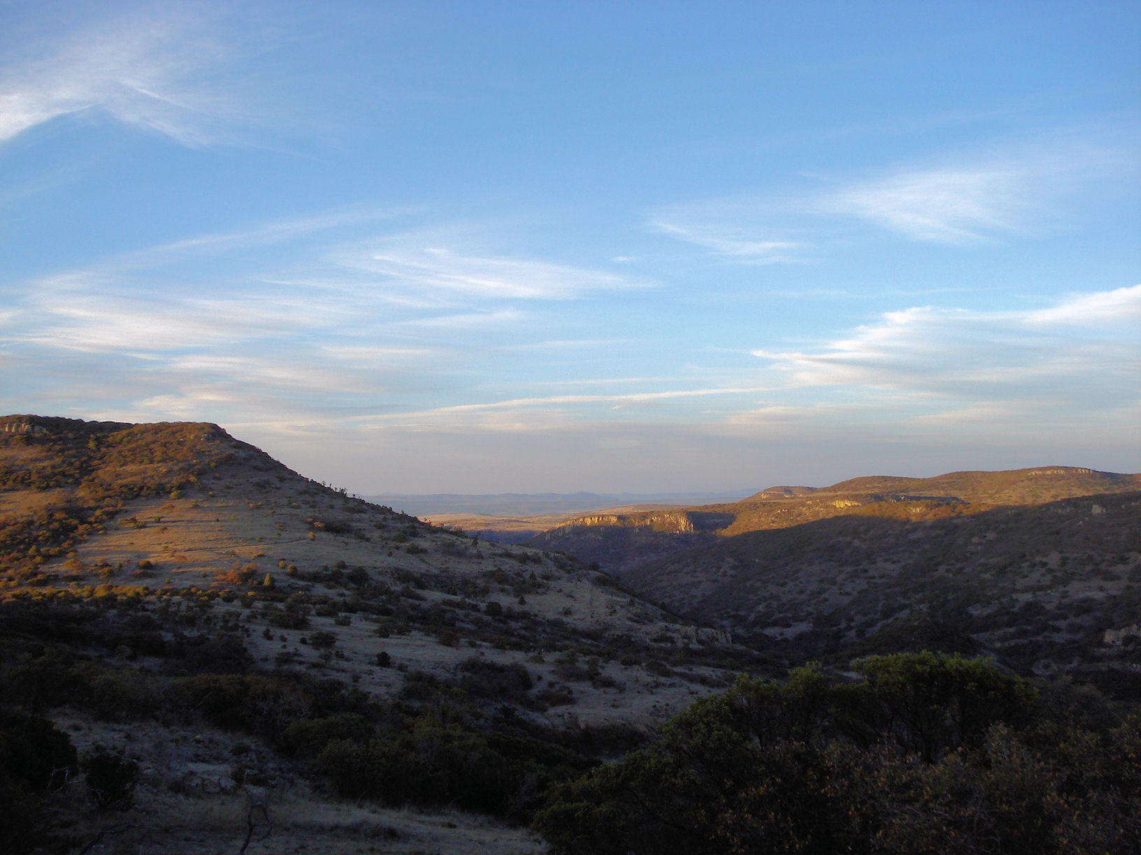 Sierra Brava